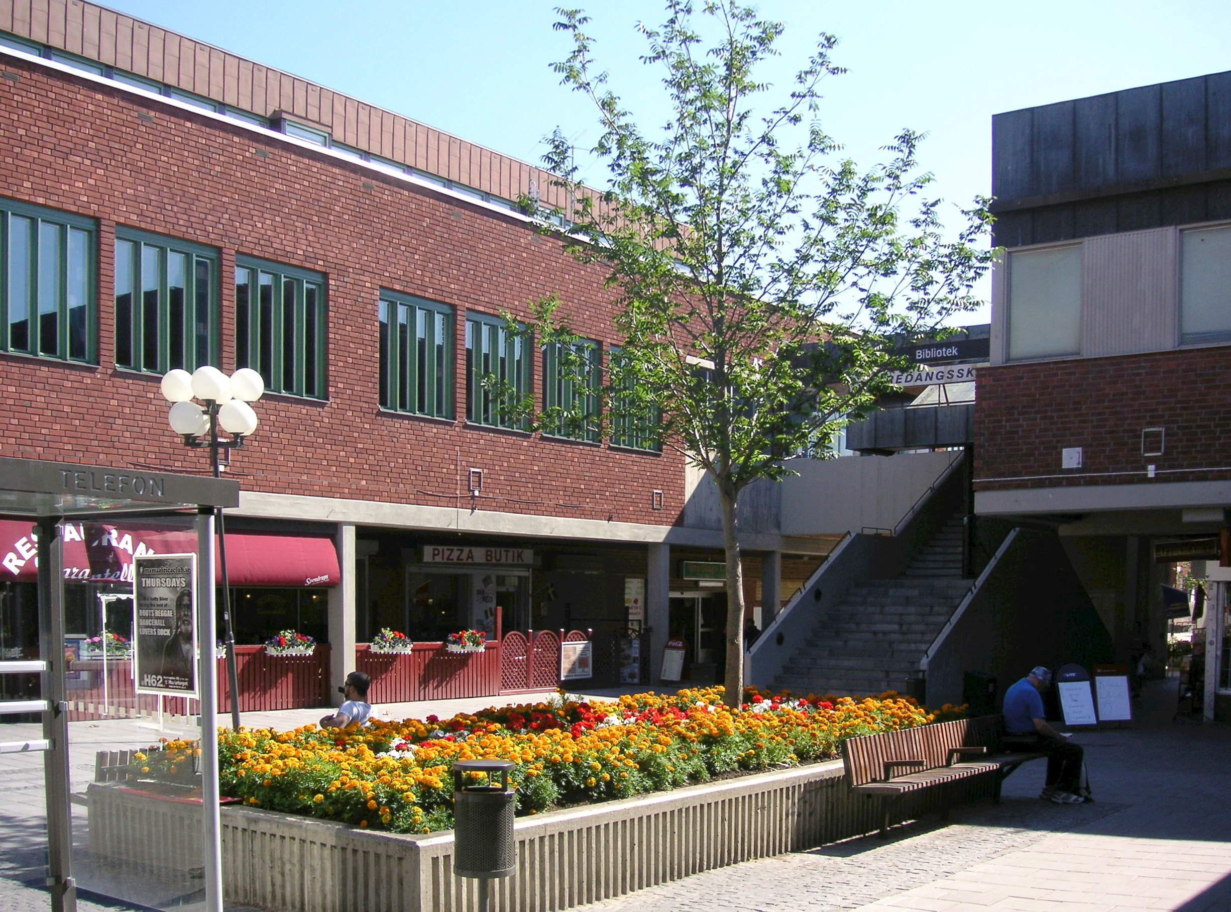 Bredängs torg sommaren 2007